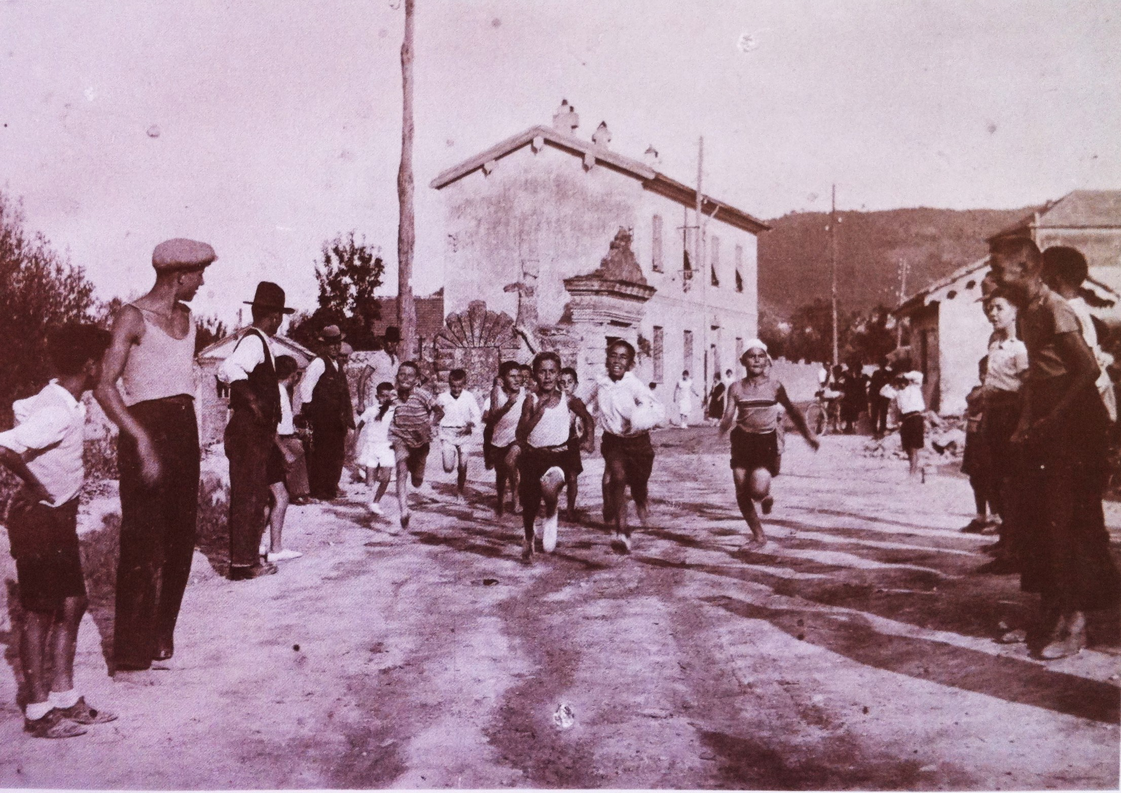 Un tempo il giorno di 'San Bartumelin', il giorno volgarmente chiamato il dì dopo San Bartolomeo, a Lusignano si facevano giochi tra i più giovani e i meno giovani, come la corsa tra i cavalli, la corsa dei sacchi e tanti altri